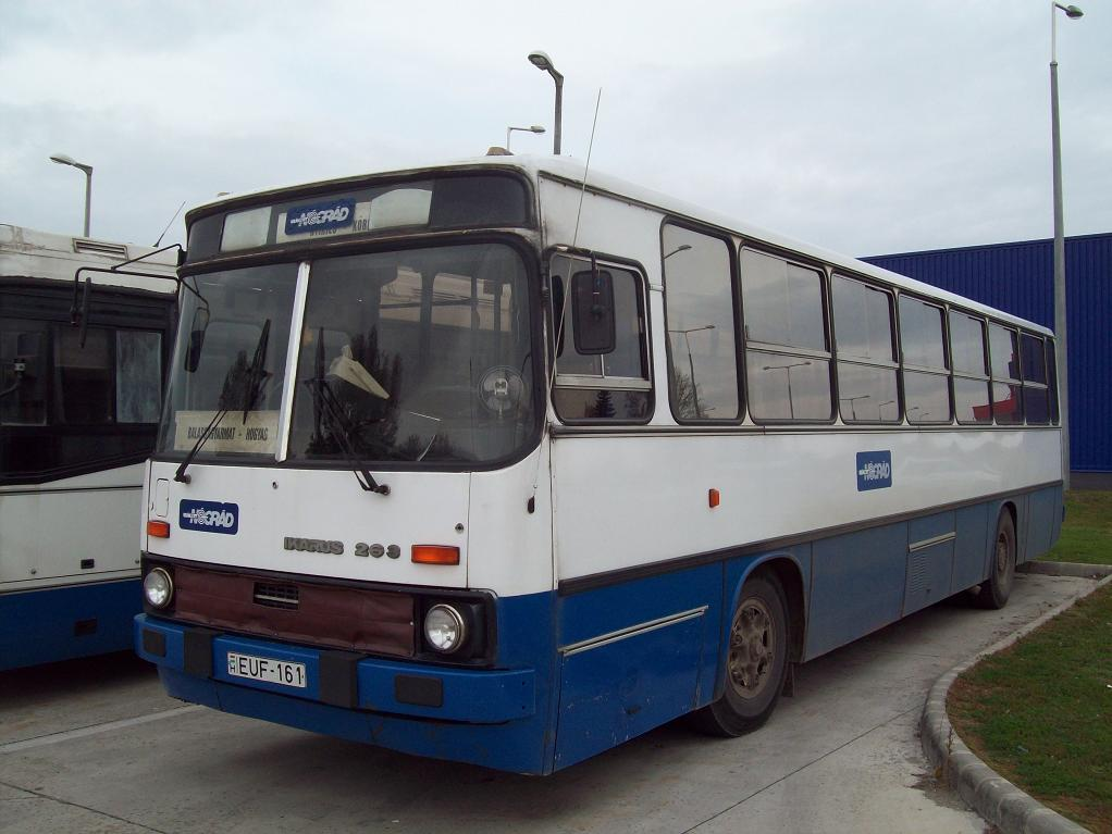 EUF-161 (FPF-989, EUF-161) Ikarus 263.04 (Balassagyarmat)